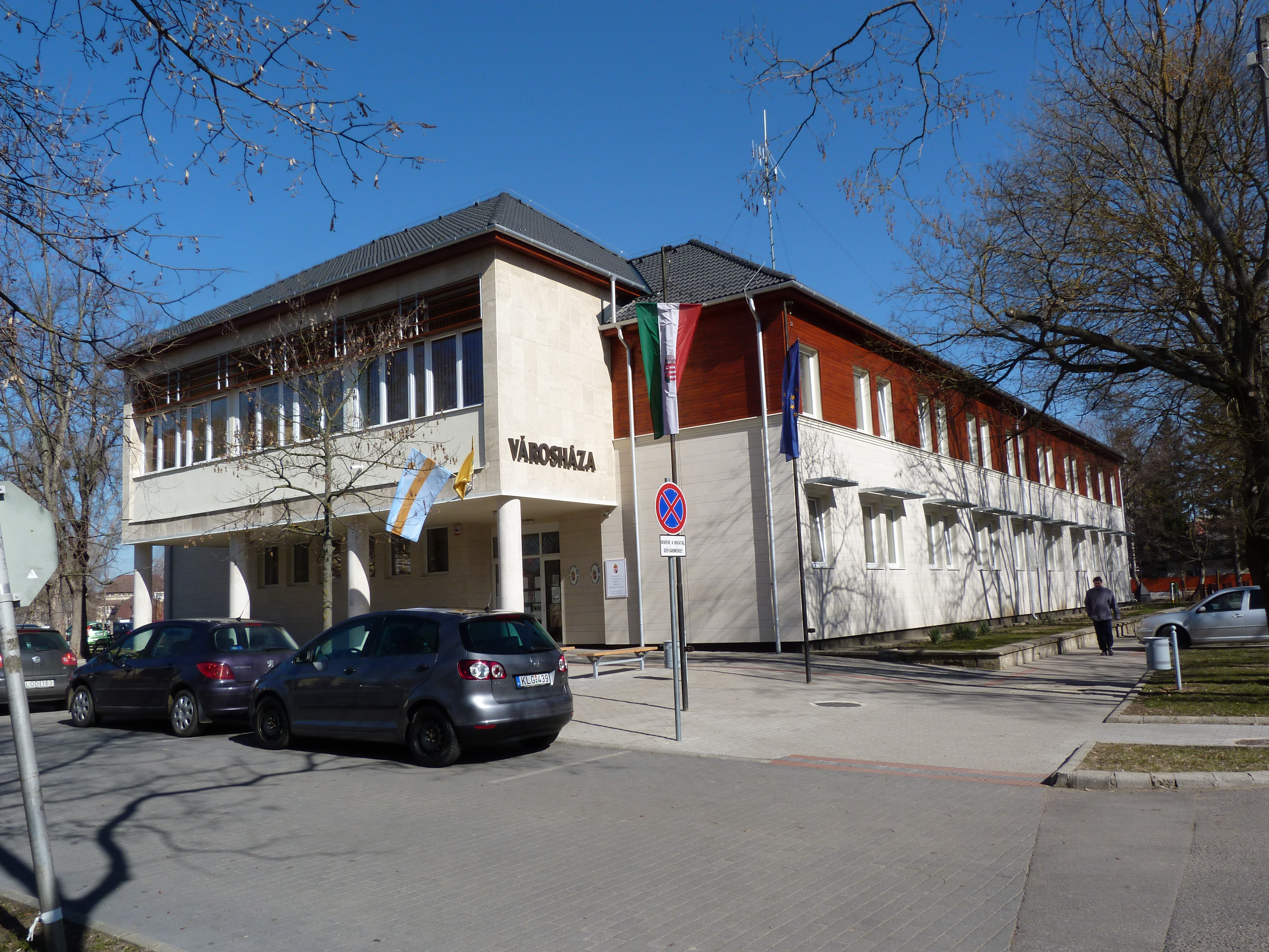 A felvétel 2013. Február 5 –én készült Vásárosnaményben.Városháza.